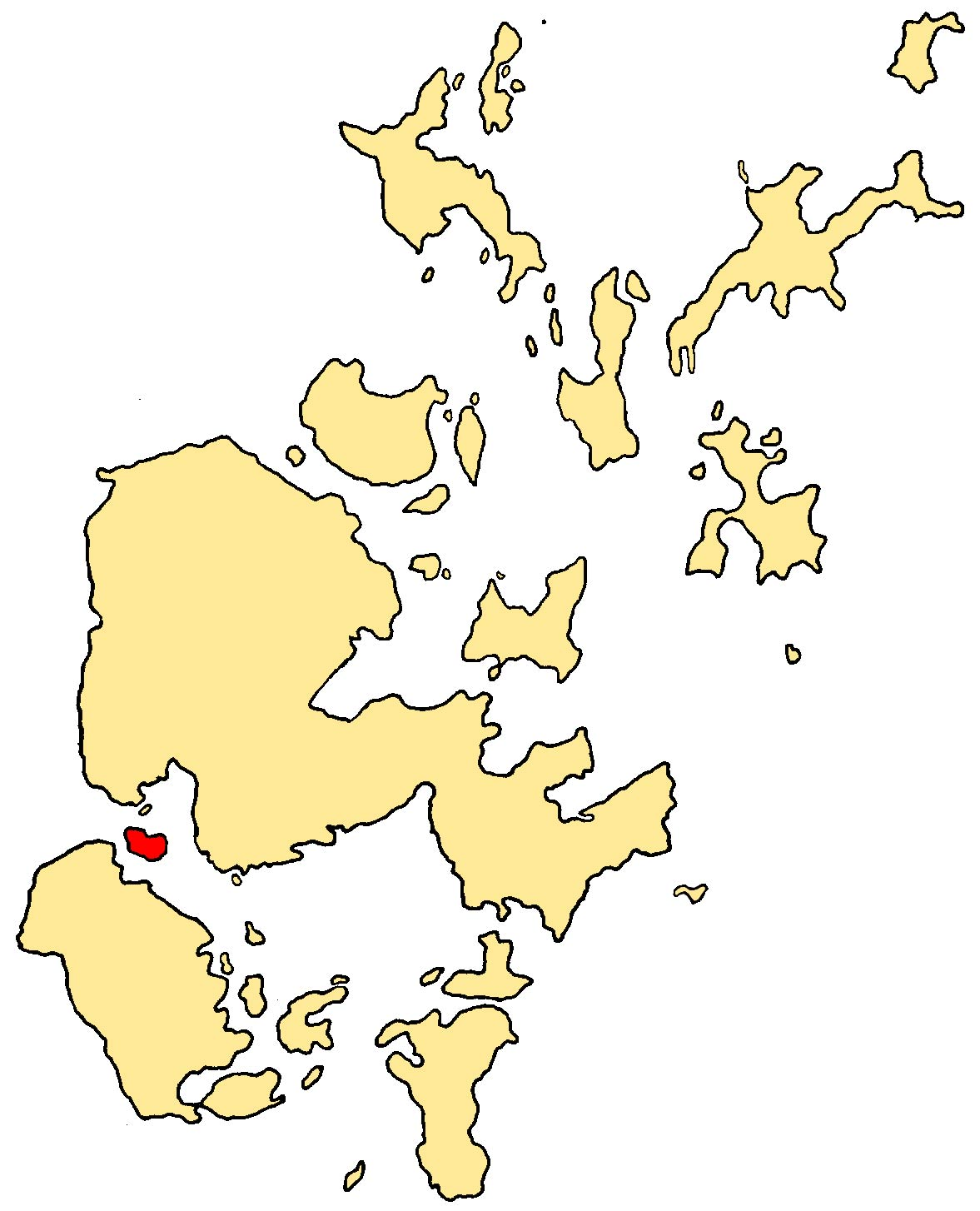 Graemsay